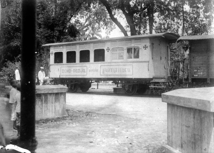 Repronegatief. Een leprawagen voor Donoredjo